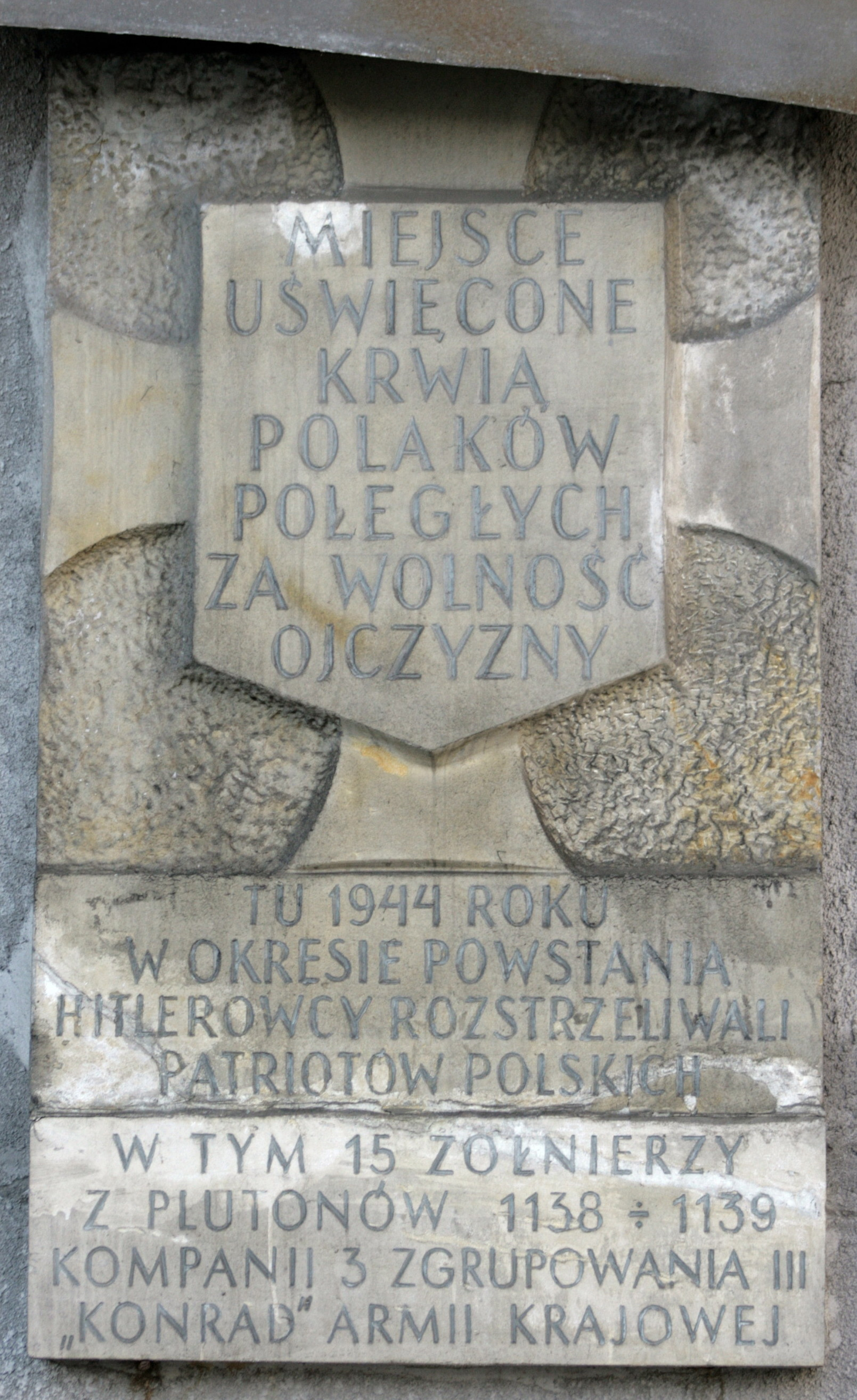 Tablica poświęcona zamordowanym Polakom w czasie powstania warszawskiego w arkadach wiaduktu Mostu Poniatowskiego w Warszawie